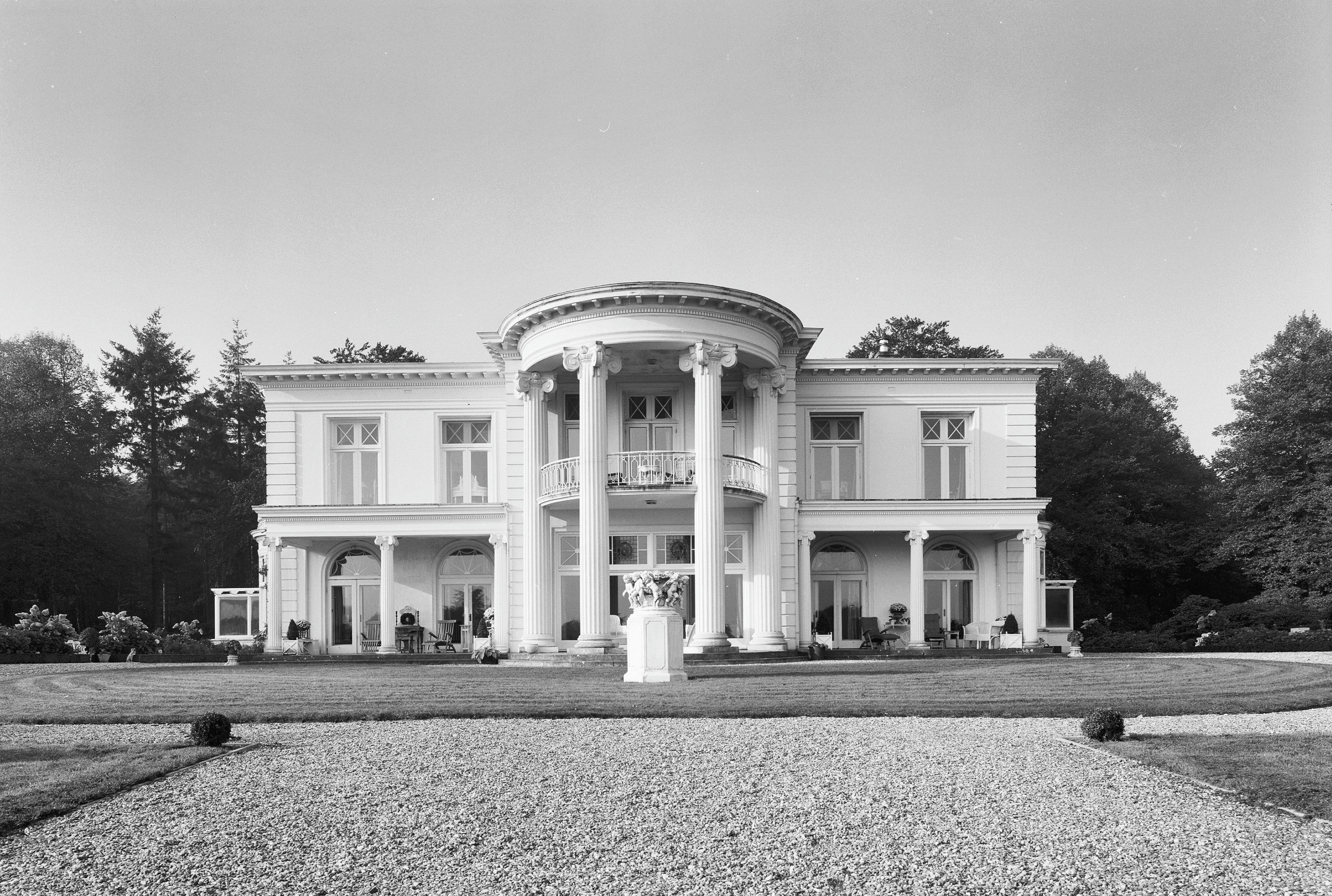 Huis te Maarn: Overzicht vanaf de tuin (opmerking: Gefotografeerd voor De Utrechtse Heuvelrug)